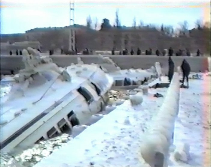 После боры, набережная Новороссийск 1993г